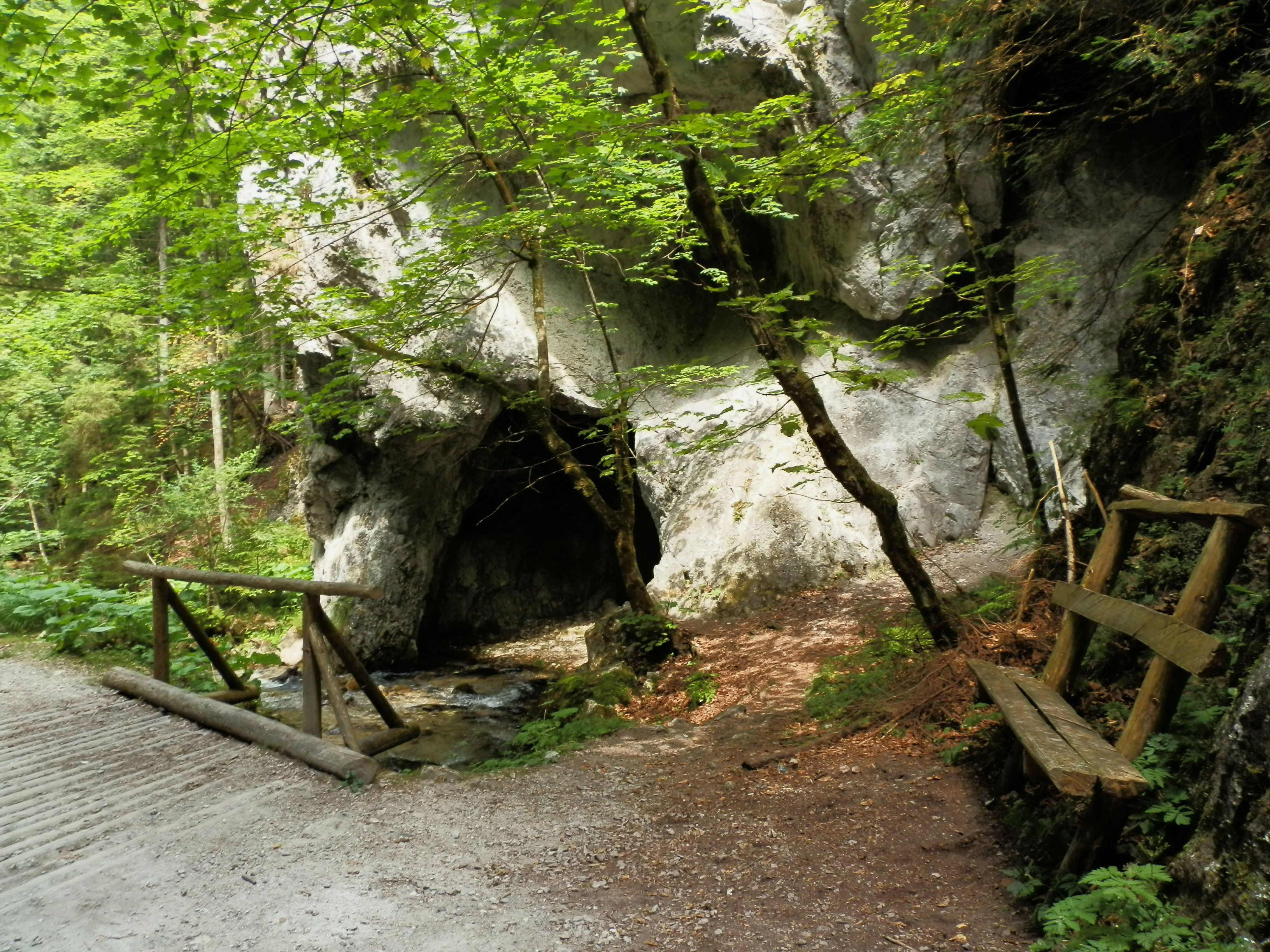 V doline Selenec